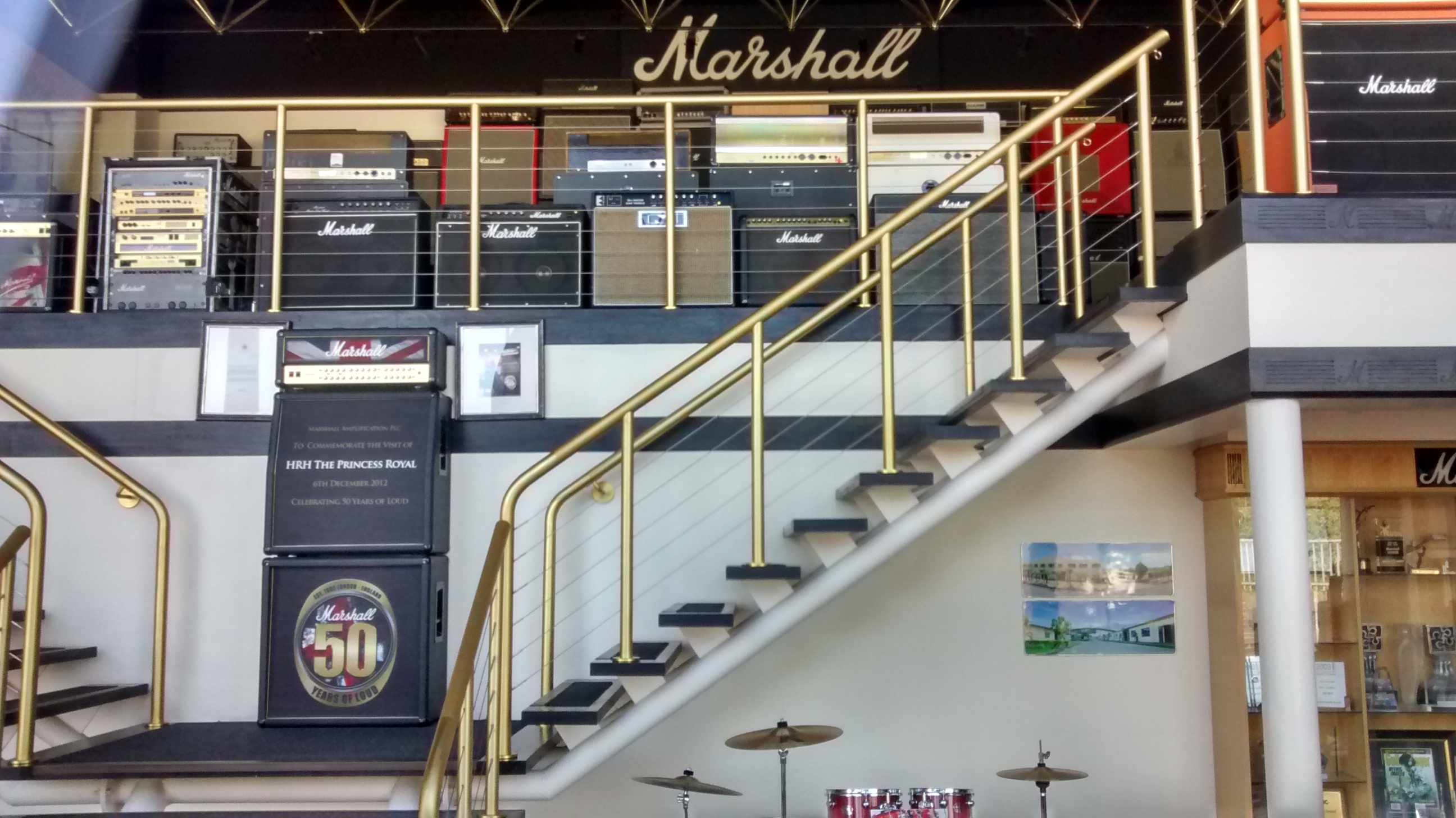 Marshall Amplification - hala główna